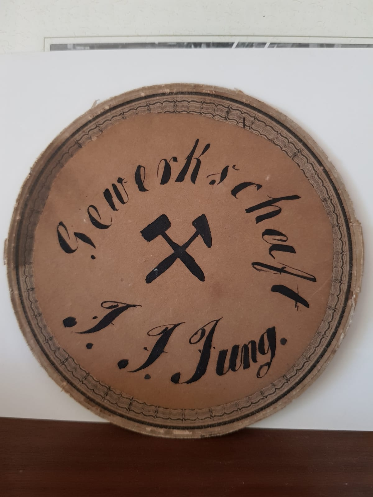 Firmenschild der Bergrechtlichen Gewerkschaft J. J. Jung